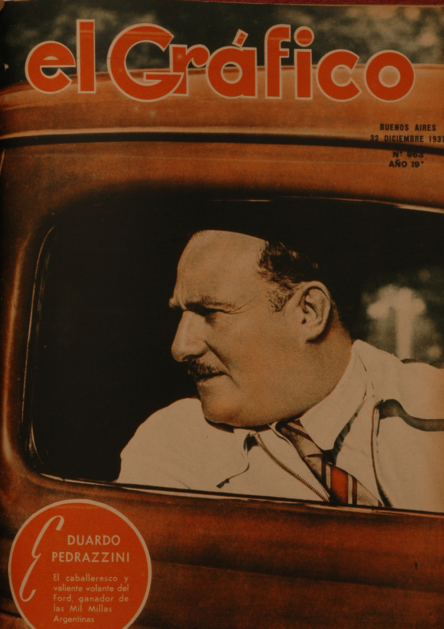 El Grafico del 22 de Diciembre de 1937. Edicion 963